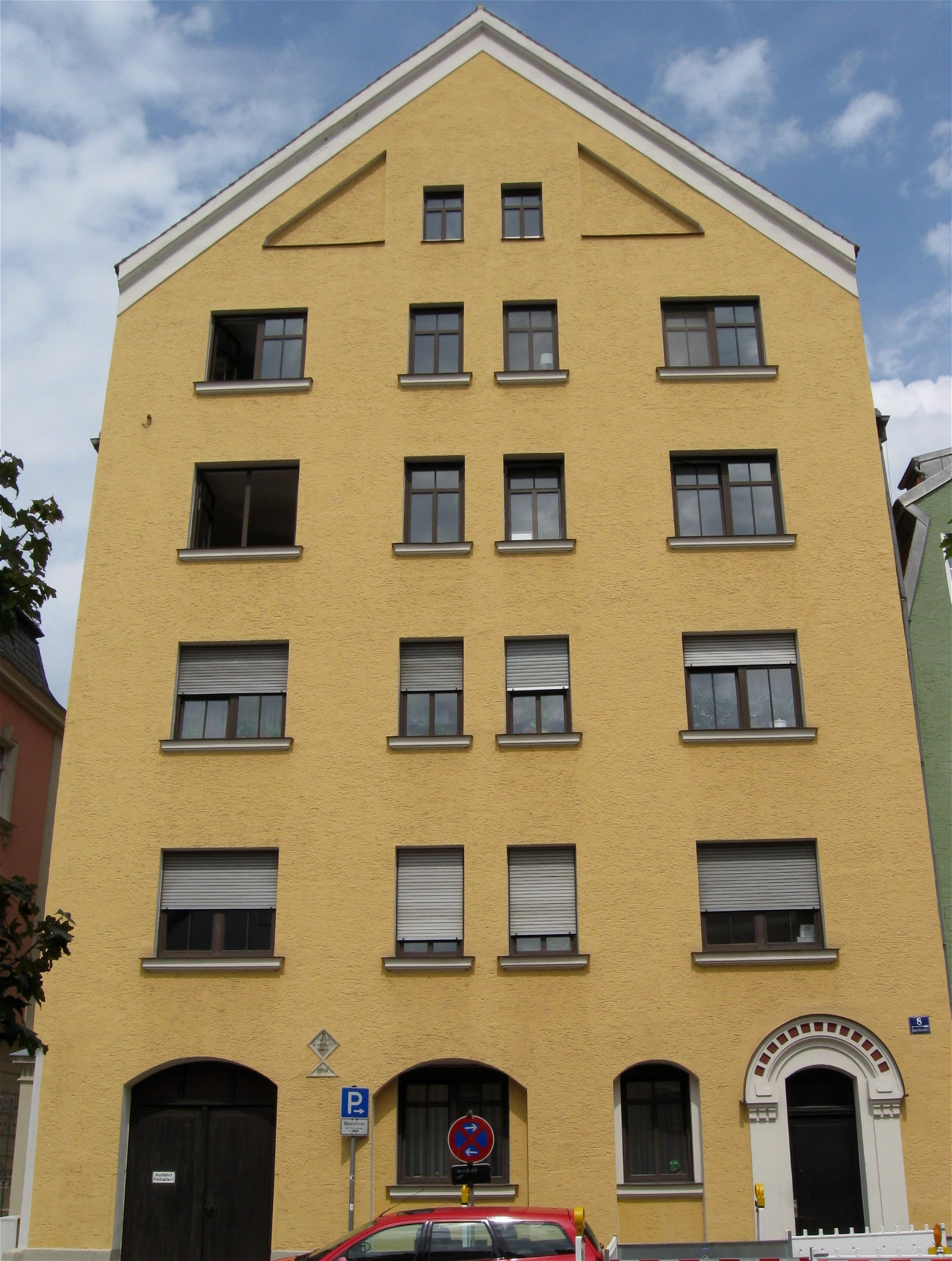 Franziskanerplatz 8. Ehem. Beamtenwohnhaus für das benachbarte Gerichtsgebäude, viergeschossiger und giebelständiger Mansarddachbau mit Vorschussgiebel, 1909/10 (bez. 1910), auf den Grundmauern der ehem. Franziskanerkirche, 1650-53.